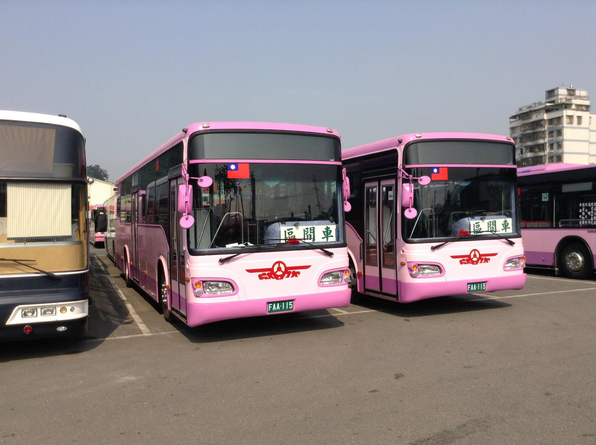 中文（台灣）: 欣欣客運2013年大客車FAA-115與FAA-113